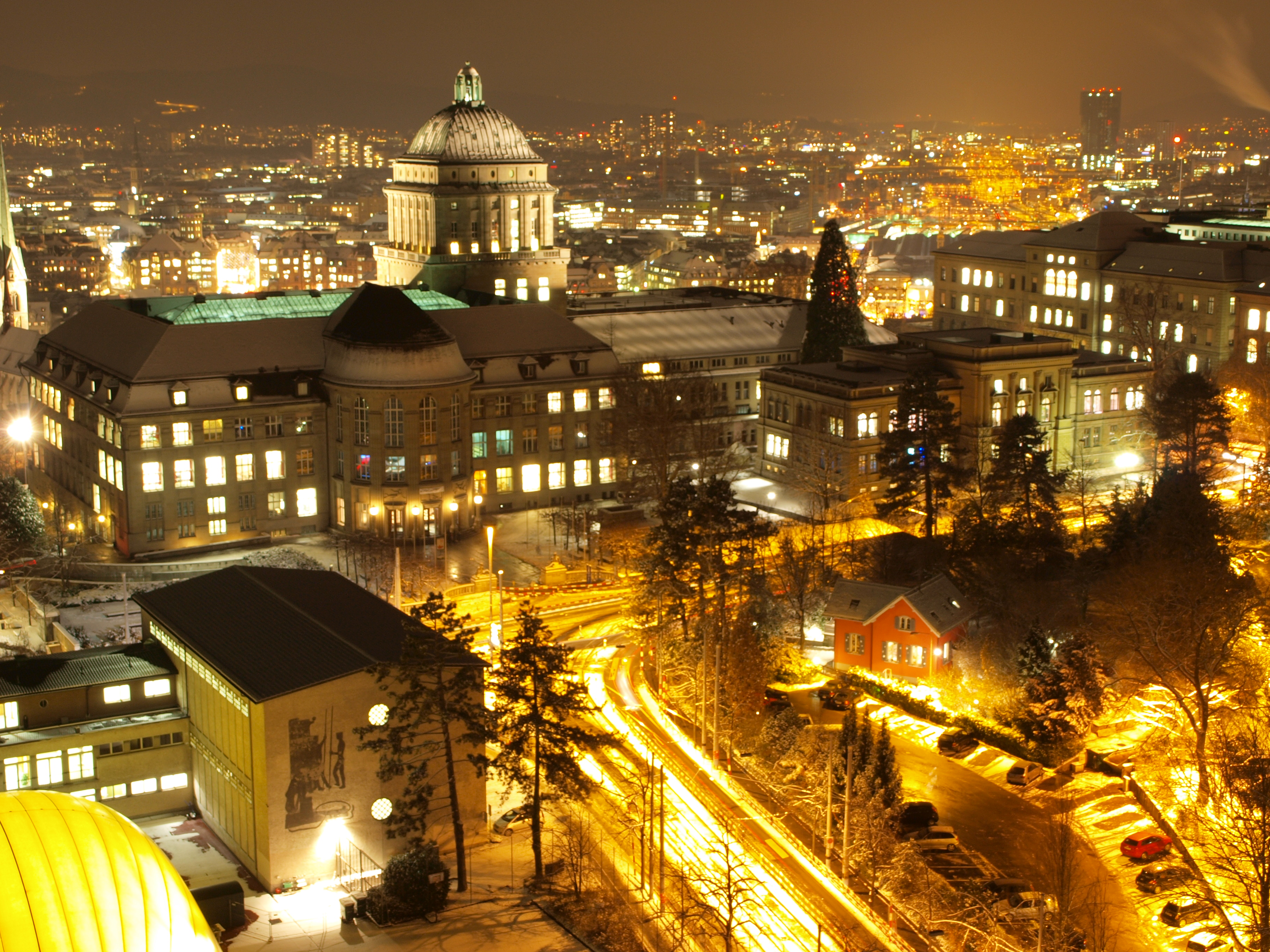 Hauptgebäude der Universität Zürich bei Nacht